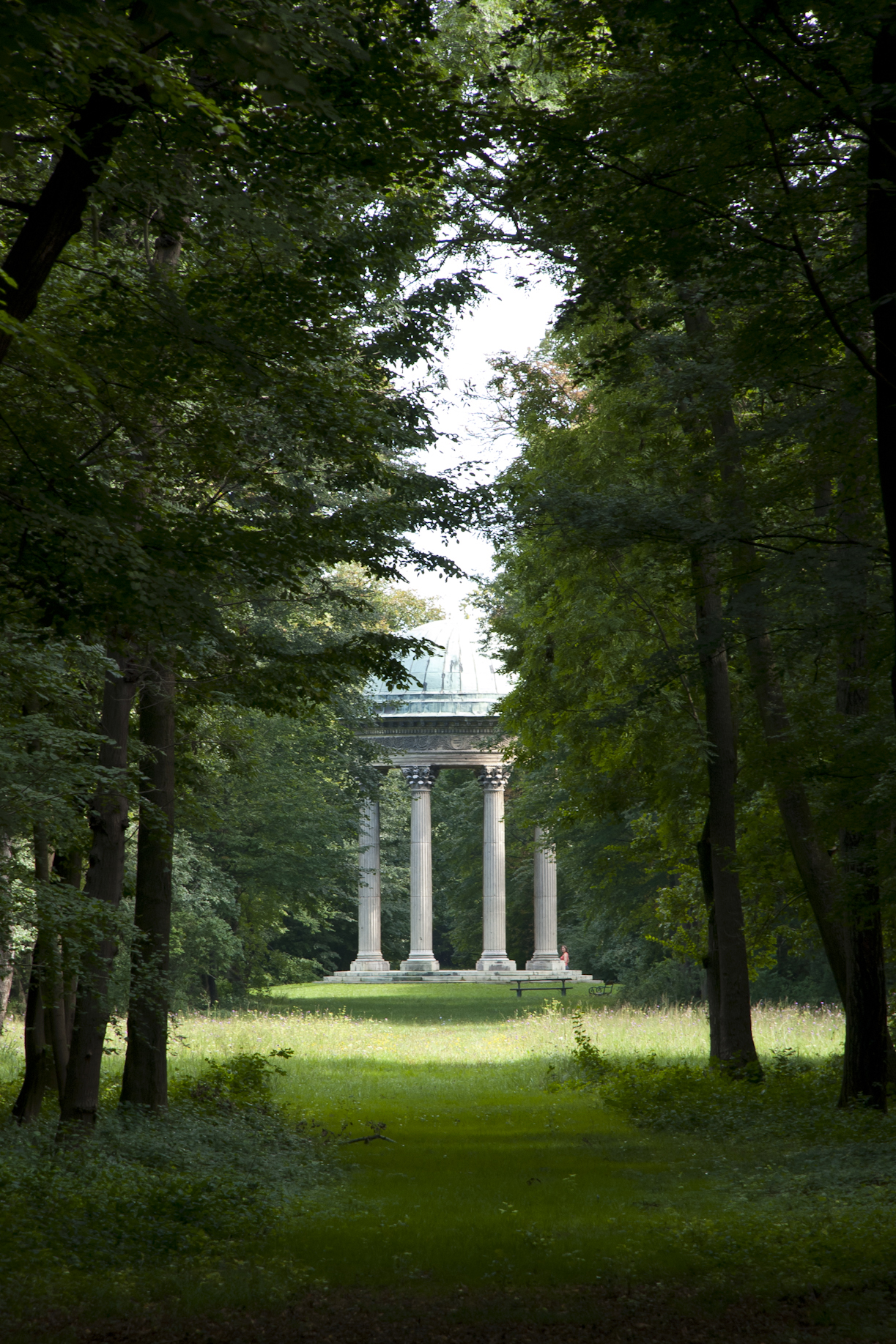 Laxenburg, Schlosspark Laxenburg, Concordiatempel